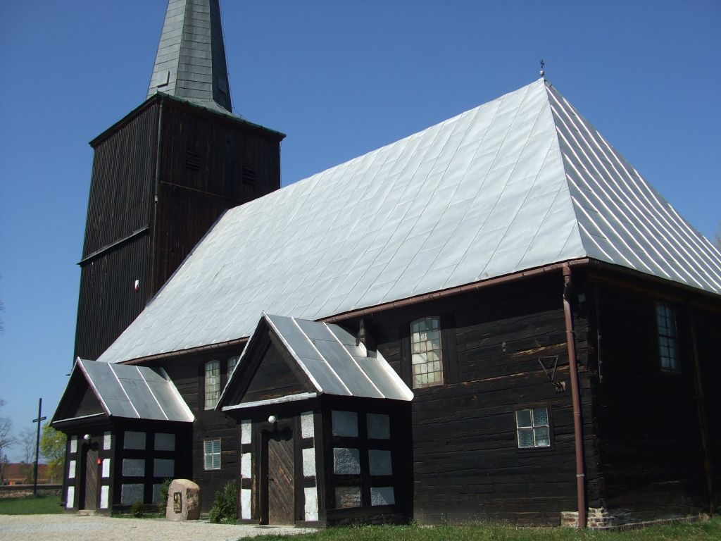 Church in Boryszyn/Kościół w Boryszynie